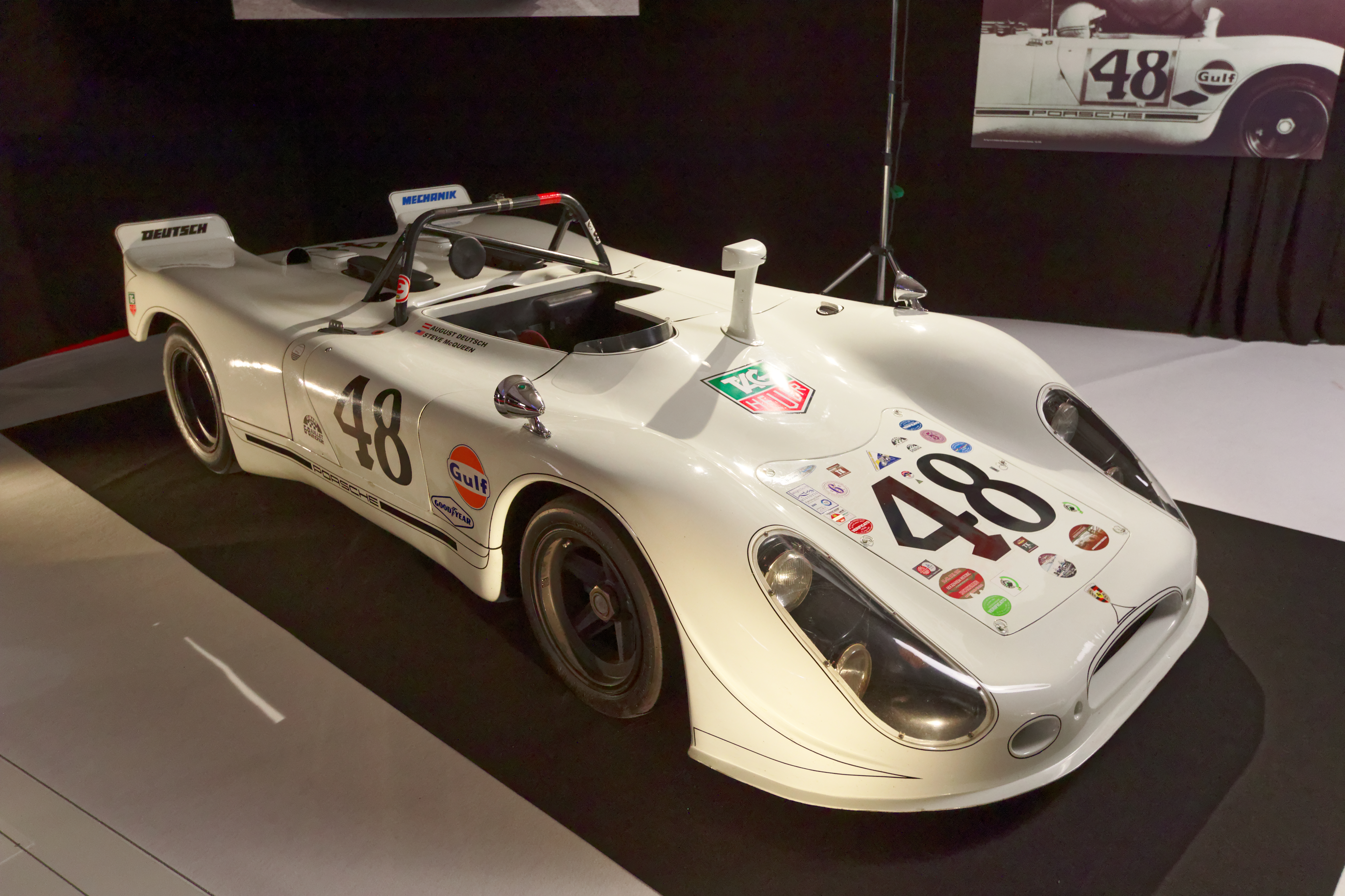 Une Porsche 908-2 Spyder de 1969 présentée lors du mondial de l'automobile de Paris 2016. Cette voiture a été pilotée par Steve McQueen, avec un pied platré et Peter Revson lors des 12H de Sebring 1970 où ils terminent deuxième. Elle a été utilisé comme voiture porte caméra lors des 24H du Mans 1970 pour le tournage du film Le Mans. Selon Willy Braillard, Steve McQueen, malgré l'interdiction de ses assureurs, aurait pris un relais en pleine nuit lors de cette course.